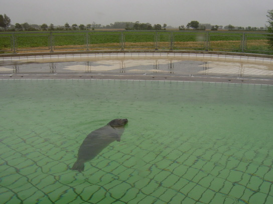 Foko en la vartejo en Pieterburen Nederlando (memfarita foto libere uzebla)